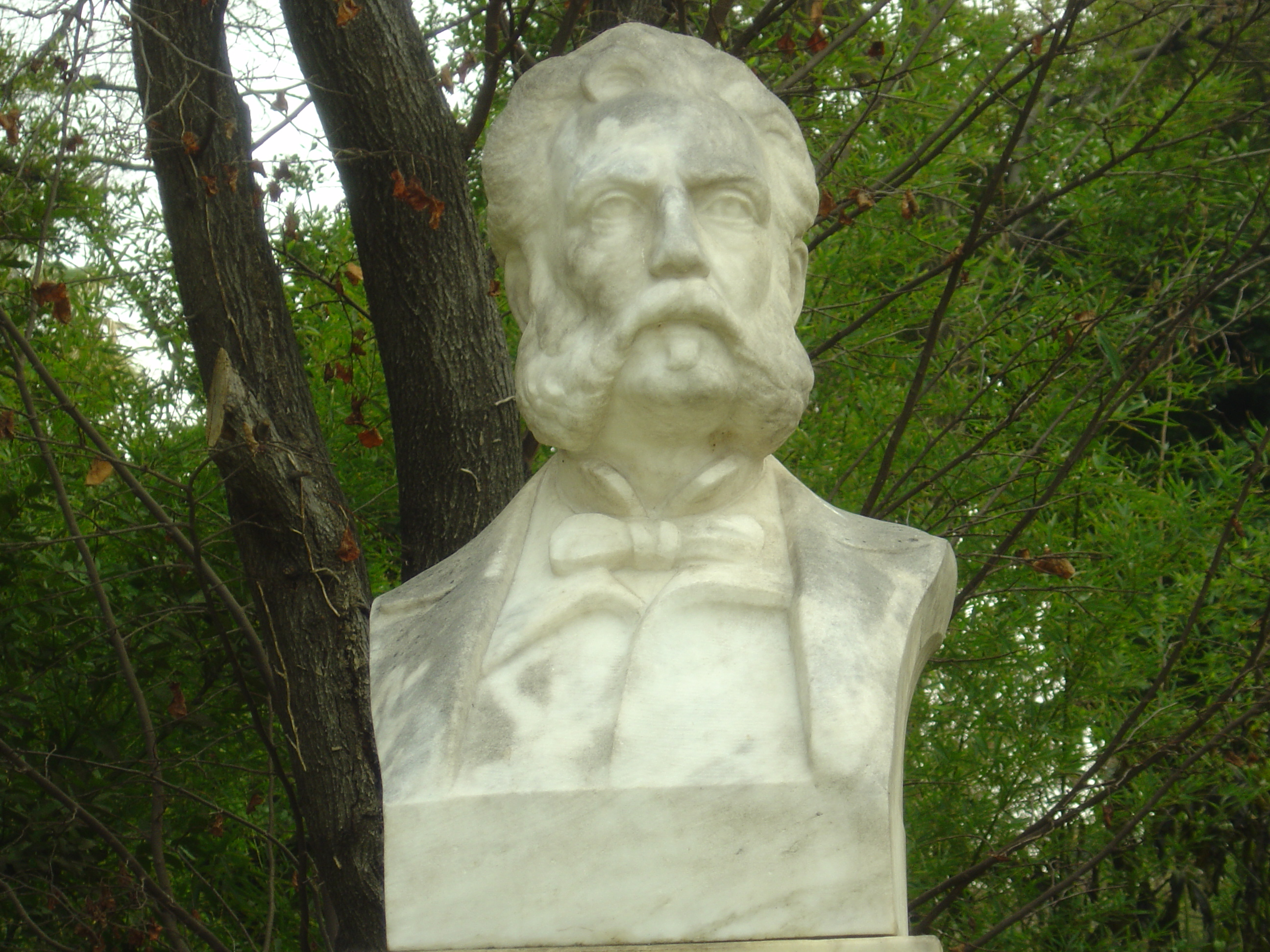 Αριστοτέλης Βαλαωρίτης. Έργο του Φωκίωνα Ρωκ (1886 - 1941). Αθήνα, Εθνικός Κήπος.